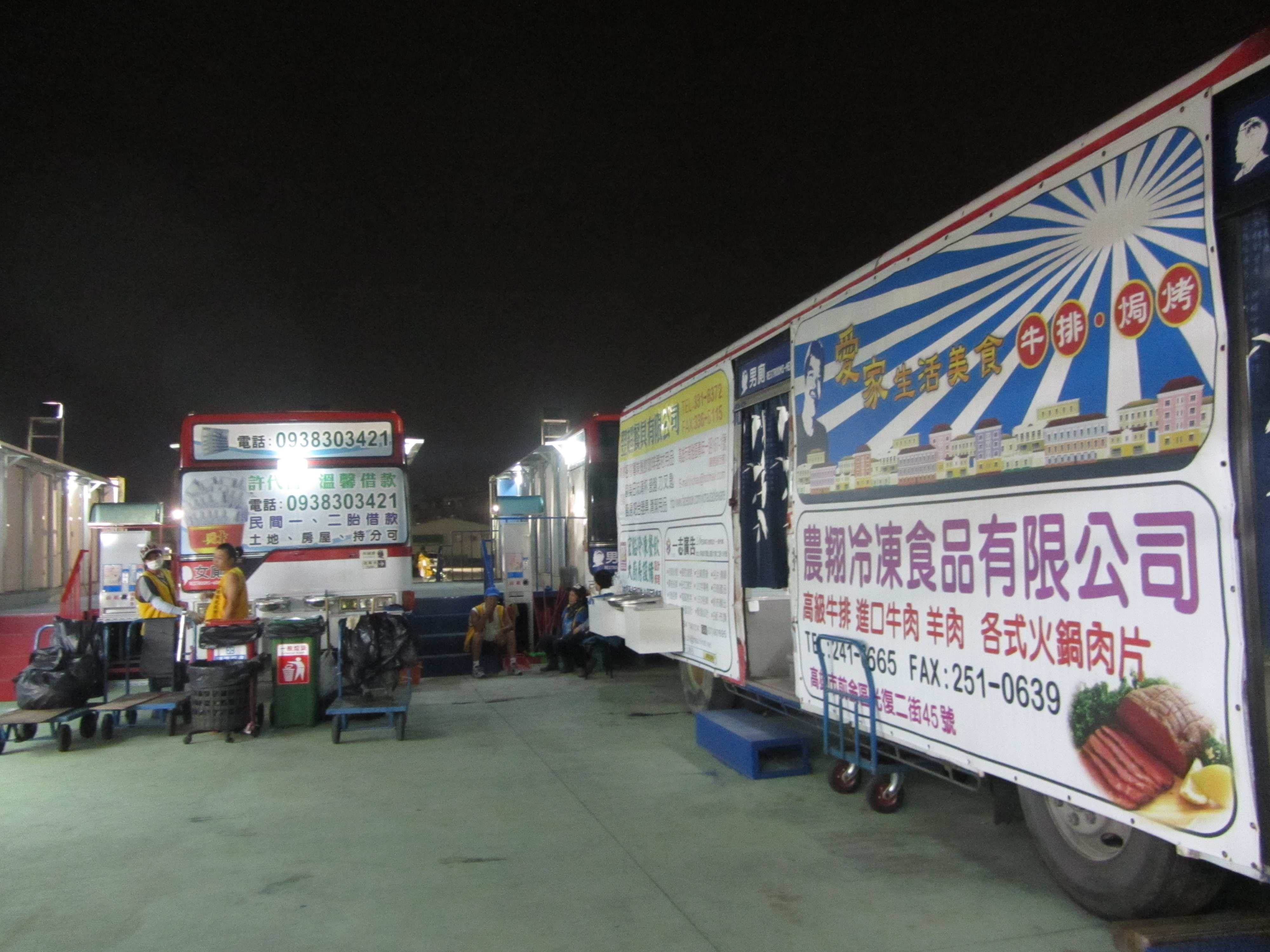 金鑽觀光夜市內以報廢的高雄市公車車輛改造的廁所